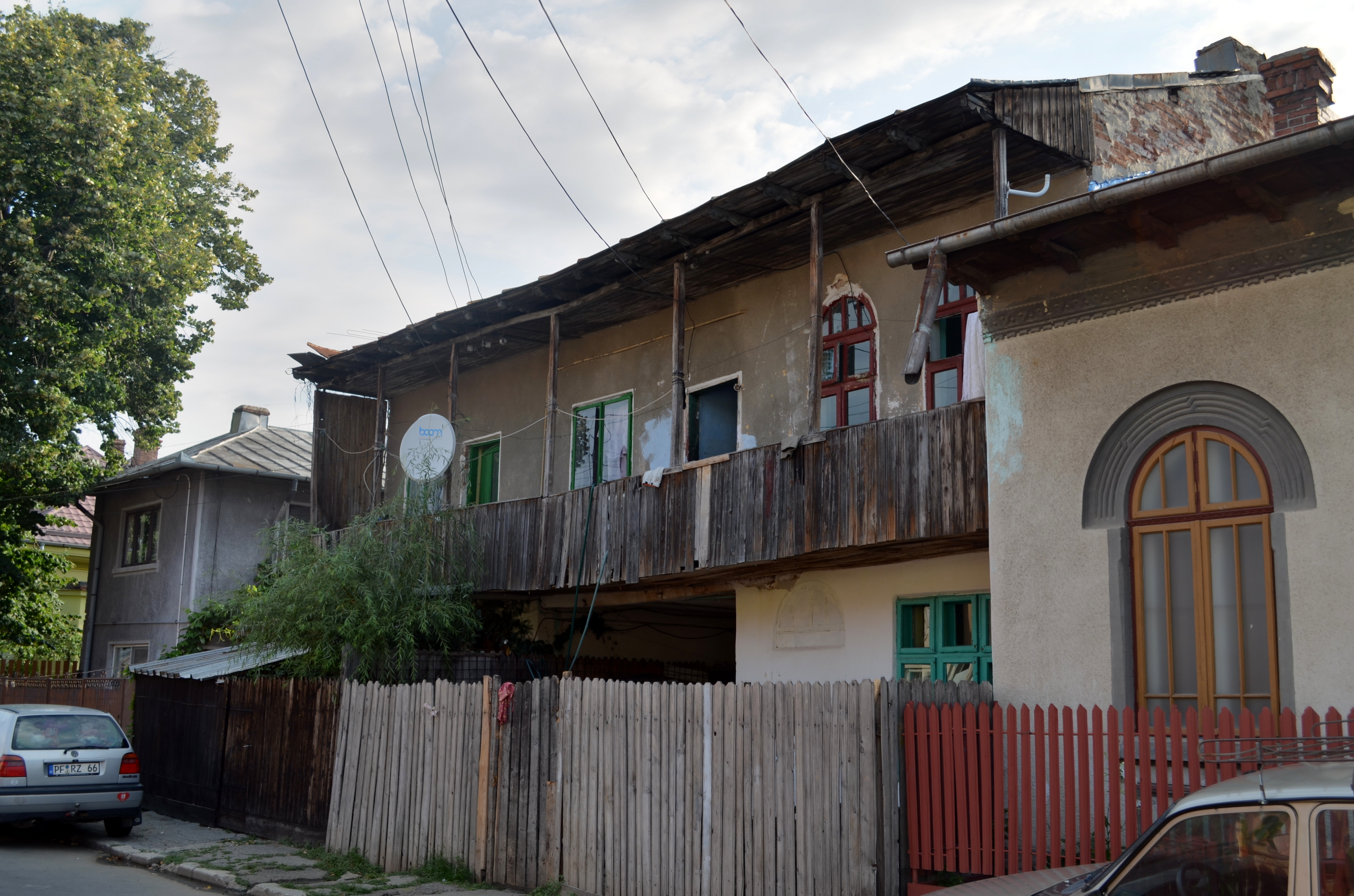 Han, ulterior locuință, Str. Iuliu Maniu nr. 10, Ploiești